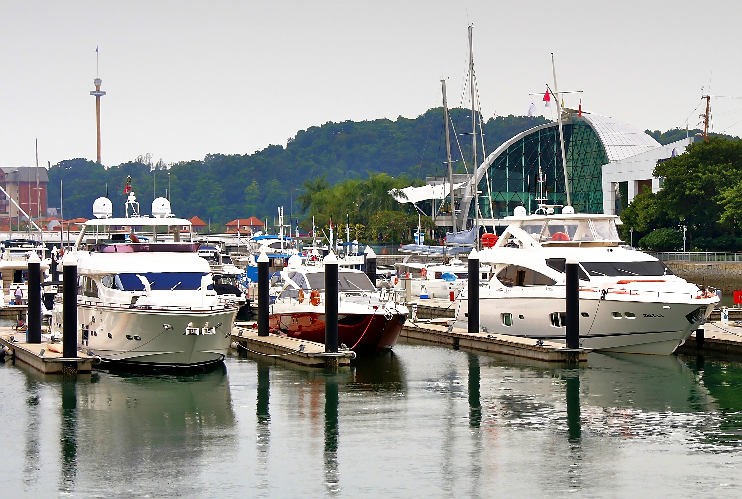 keppel marina